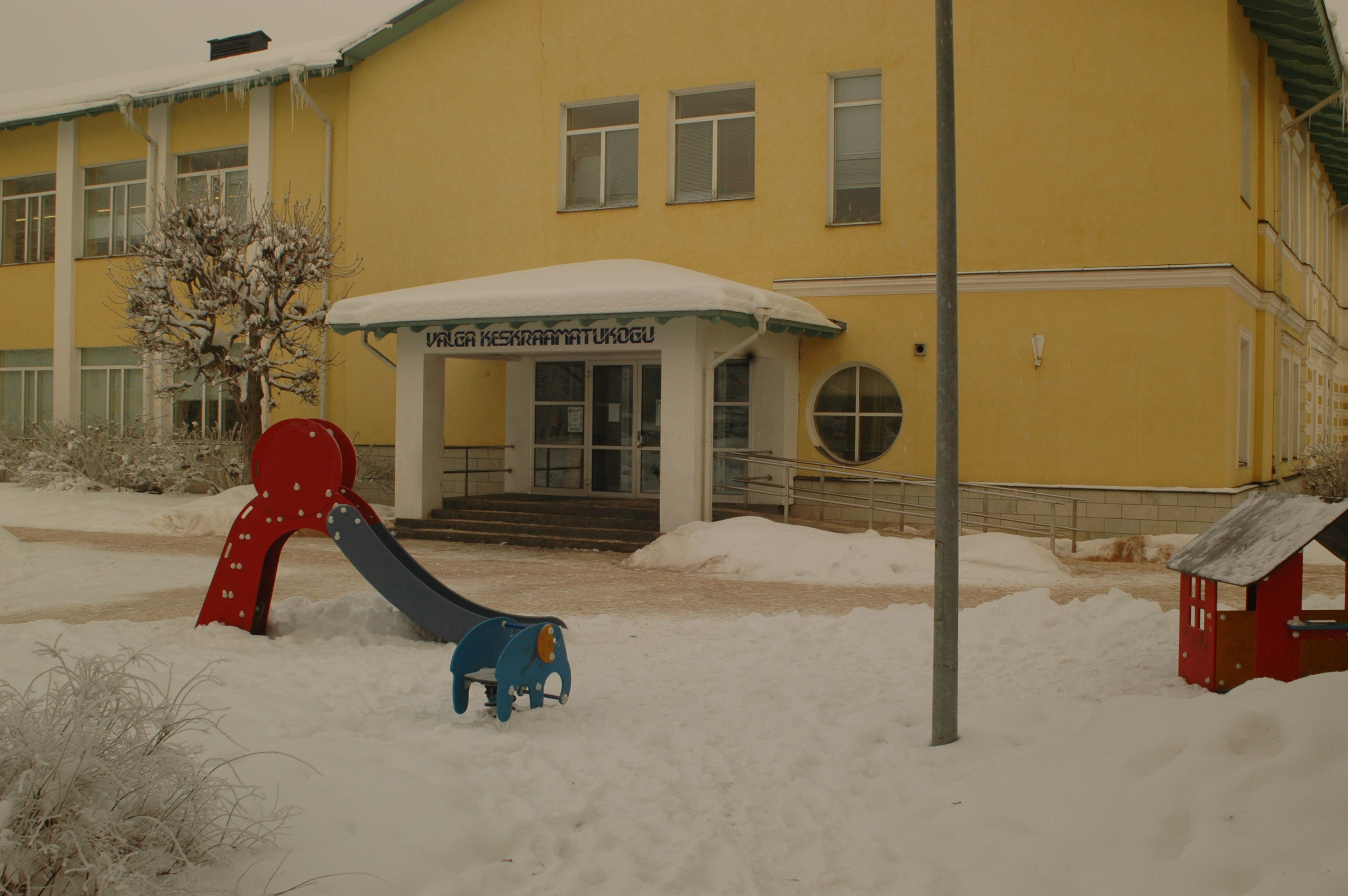 Raamatukogu paraaduks koos mänguväljakuga